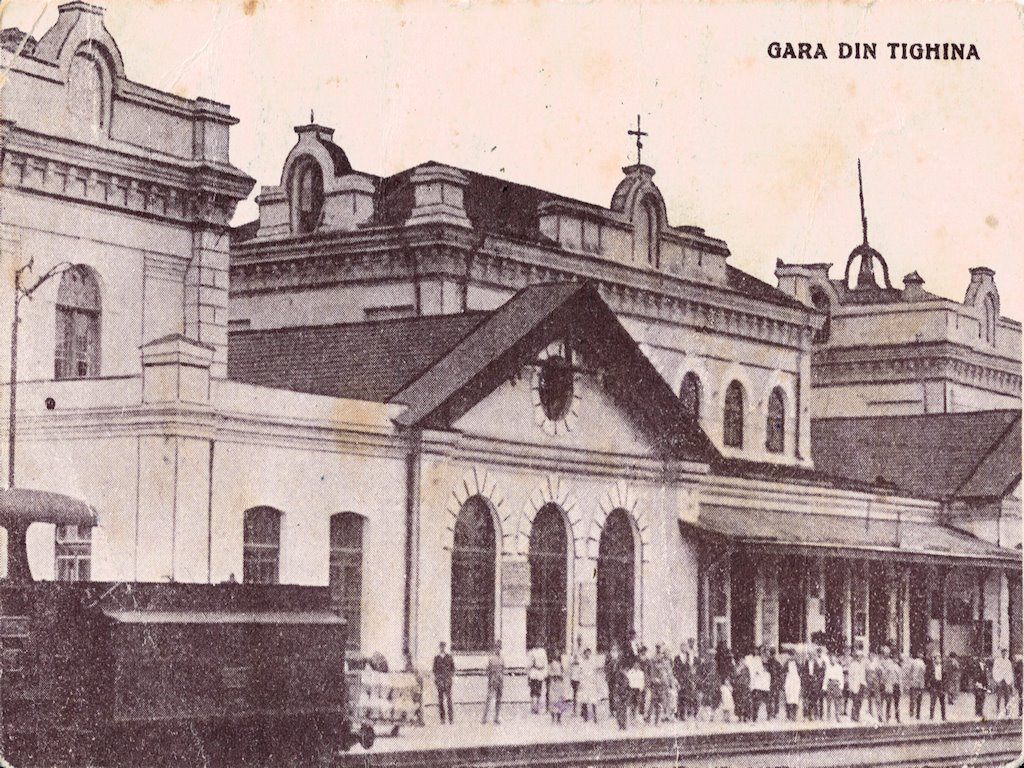 Gara din Tighina, în perioada interbelică